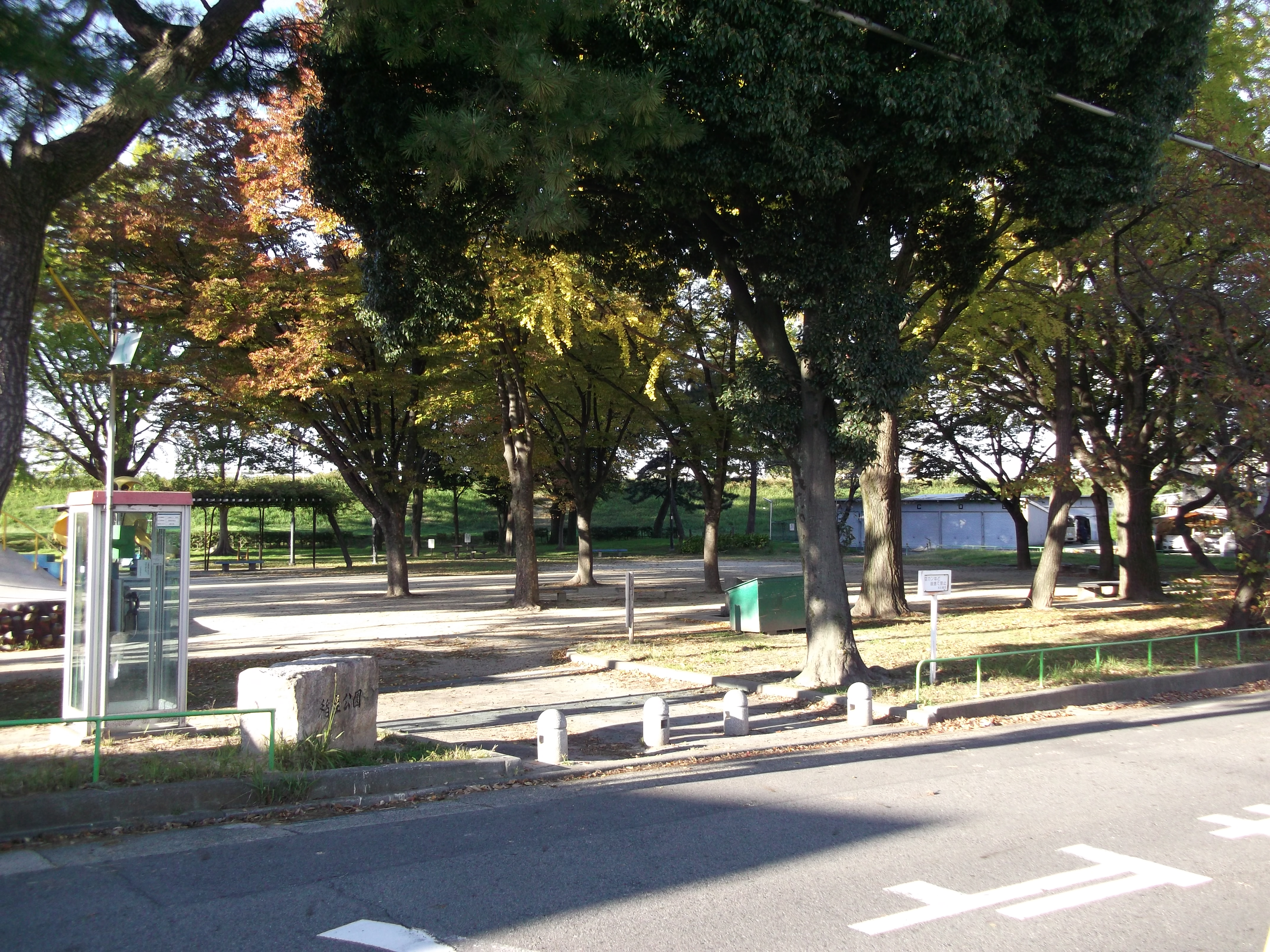 名古屋市北区福徳町に所在する稲生公園